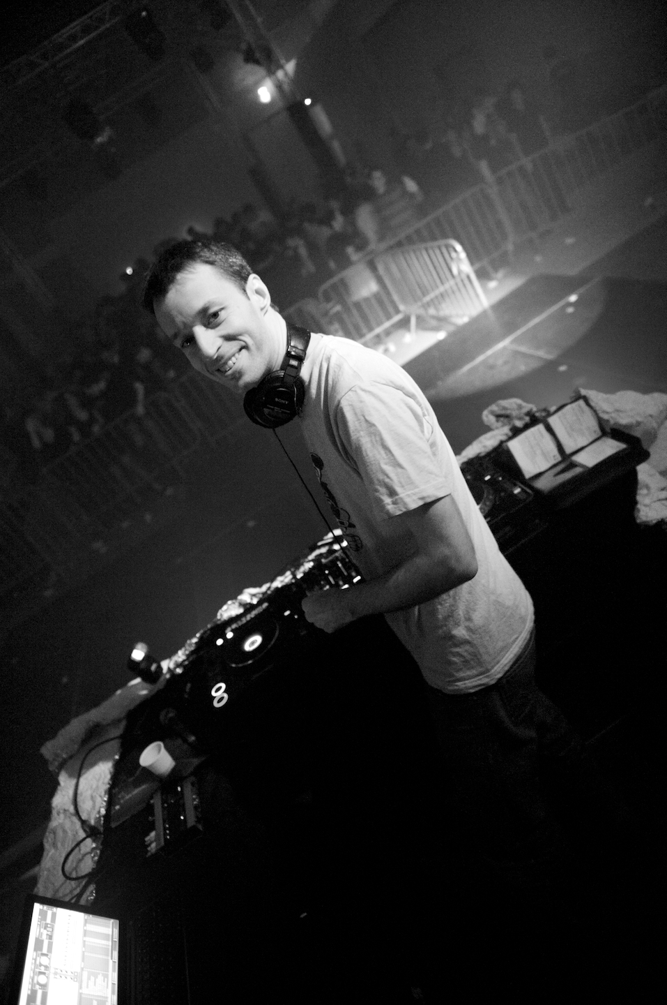 Muttonheads en concert.